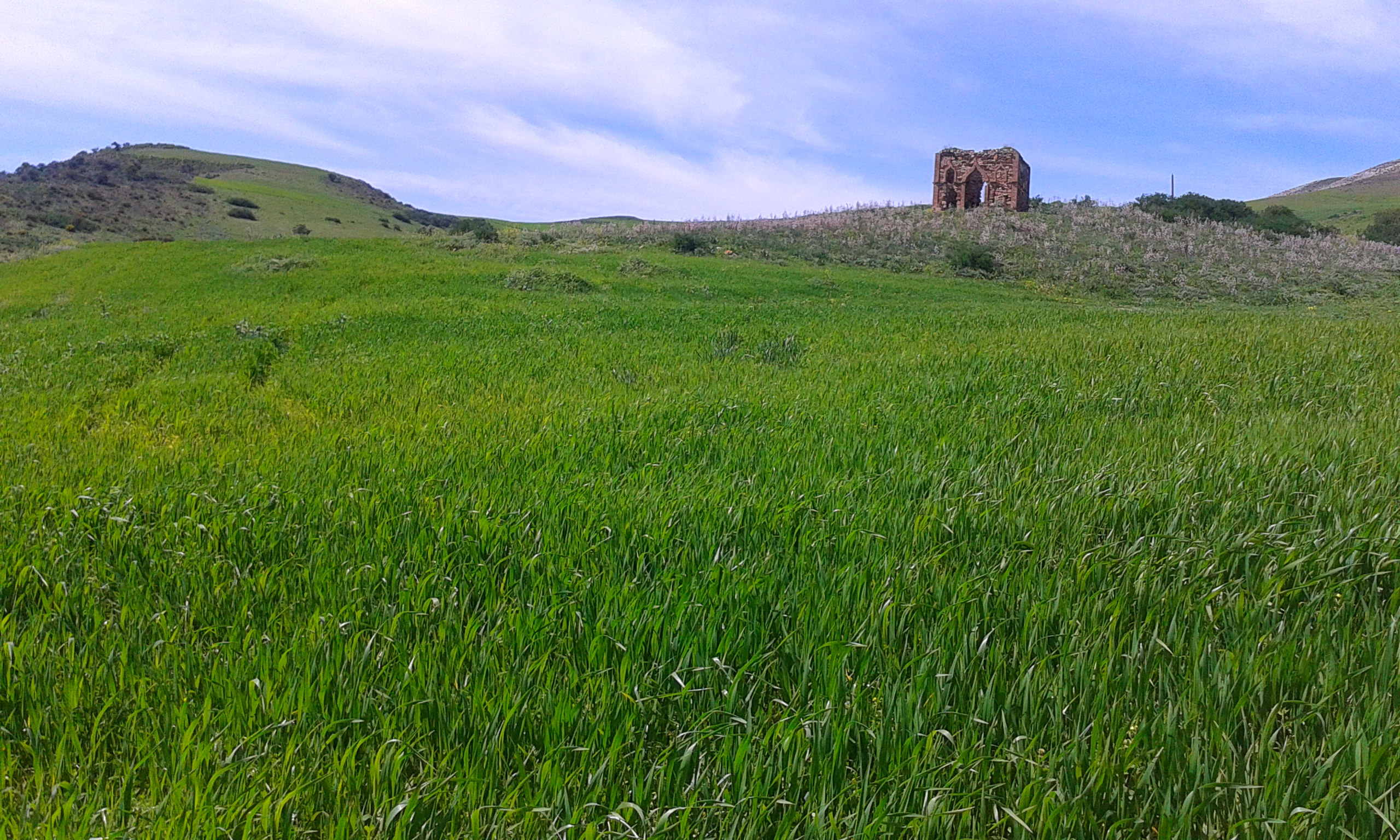 Champs de Blé ,Guelma , Algérie This is an image of food from Algeria